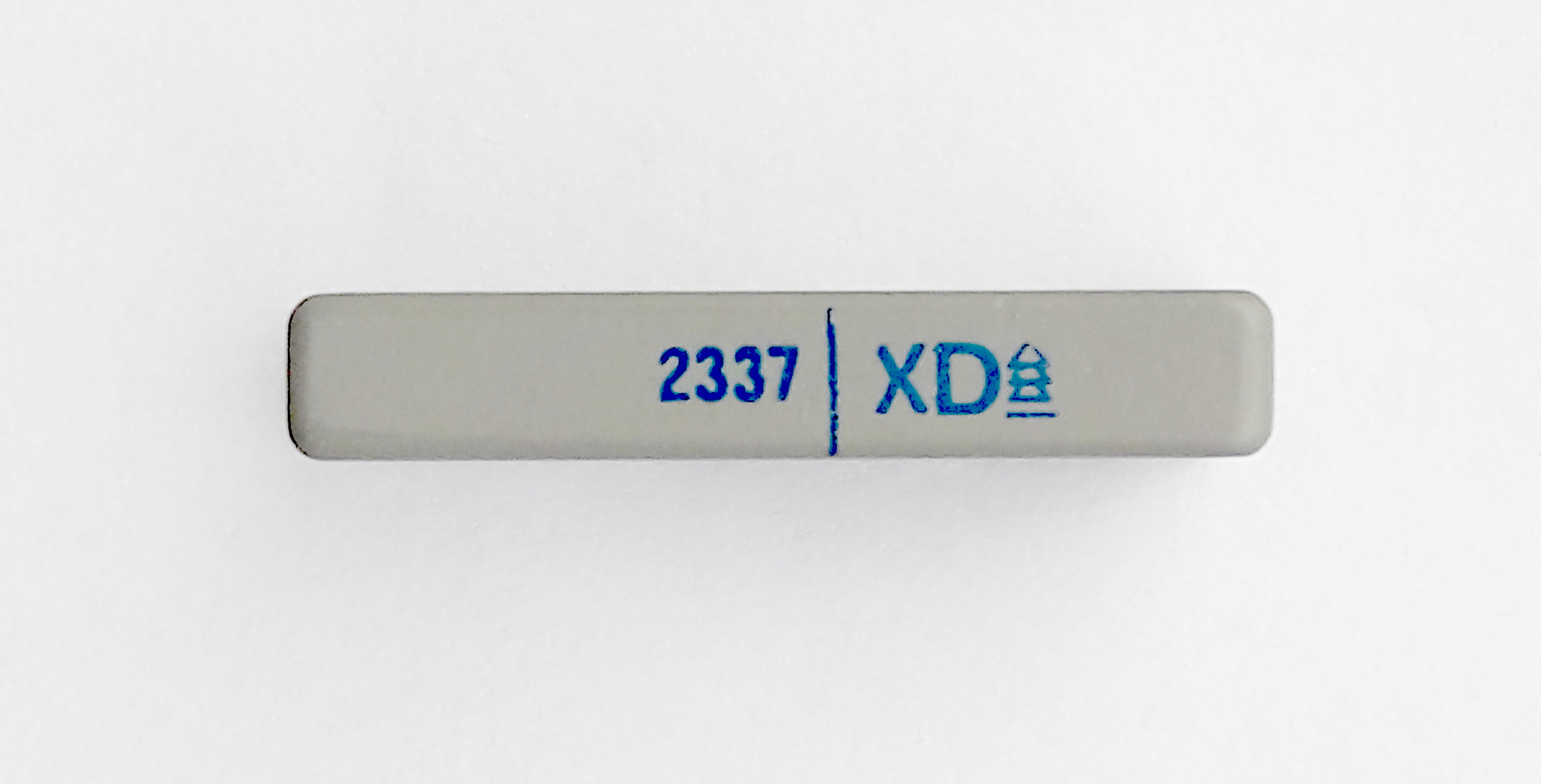 Dünnschicht- Hybridschaltkreis Typ 2337 (auch 23-37) aus der Typenreihe KME3, hergestellt im VEB Keramische Werke Hermsdorf, Ansicht von oben